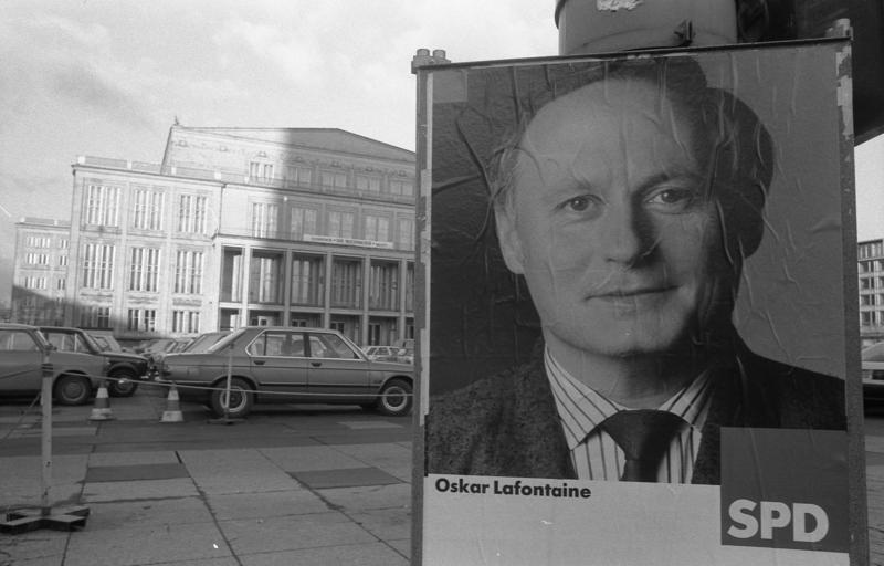 30.11.1990 Wahlwerbung der Parteien für die Wahl zum ersten gesamtdeutschen Bundestag in Leipzig.